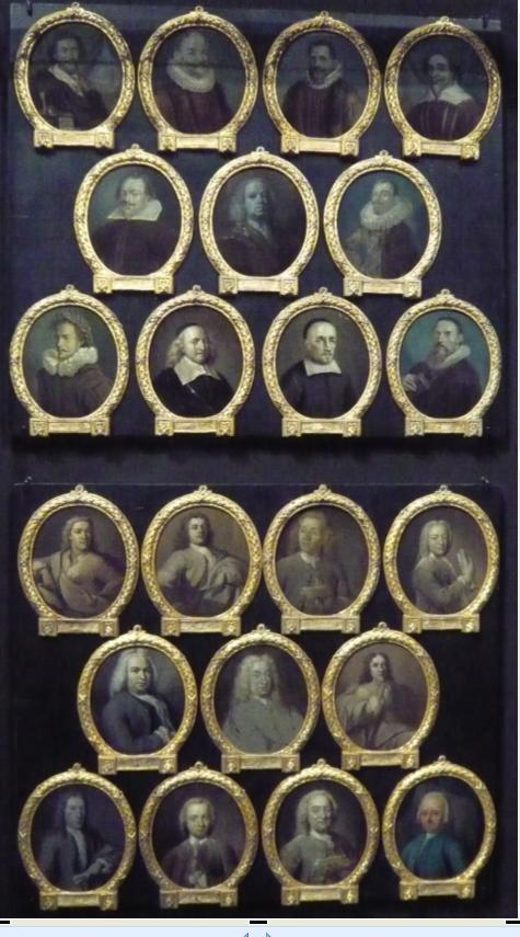 Two panels of Arnoud van Halen's Panpoëticon Batavum in the Rijksmuseum